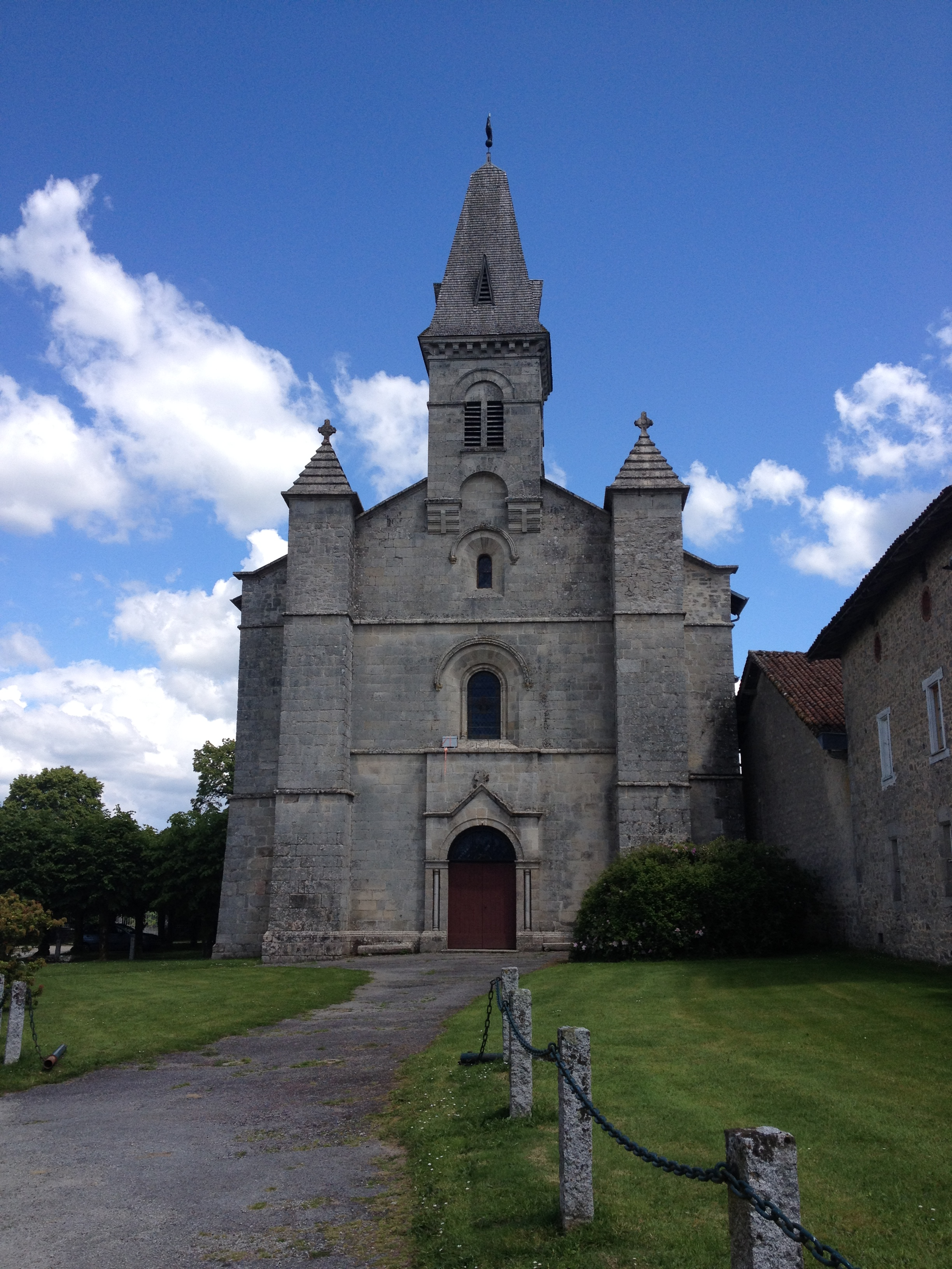 L'église Saint-Gaucher, dans le bourg d'Aureil vue de face.